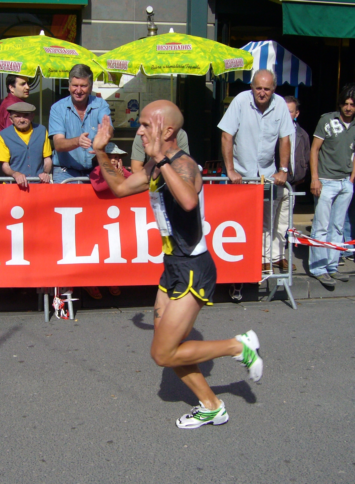 Le marathonien français Benoît Zwierzchiewski à l'arrivée Marvejols-Mende 2007 French marathon man Benoît Zwierzchiewski finishing the 2007 Marvejols-Mende